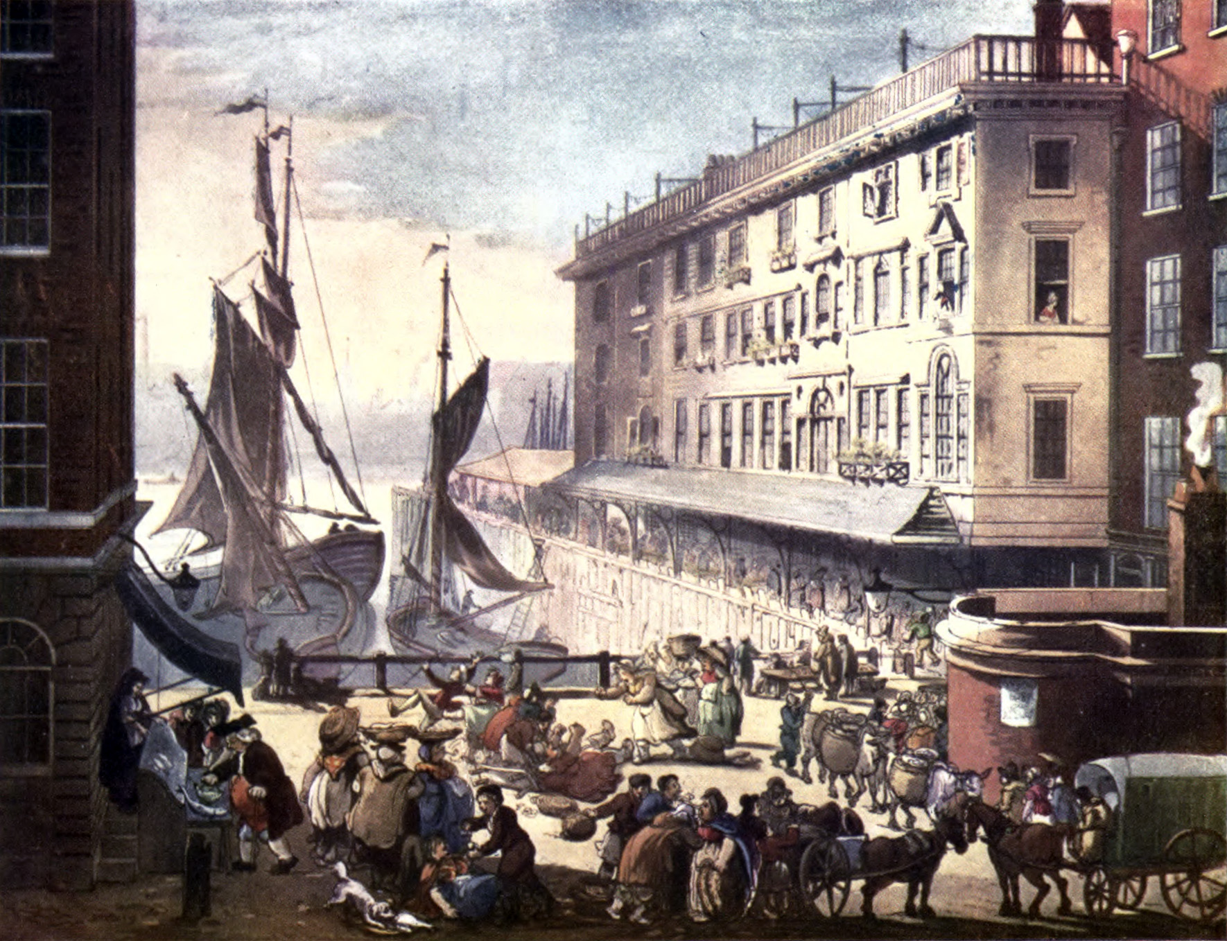 Billingsgate Market